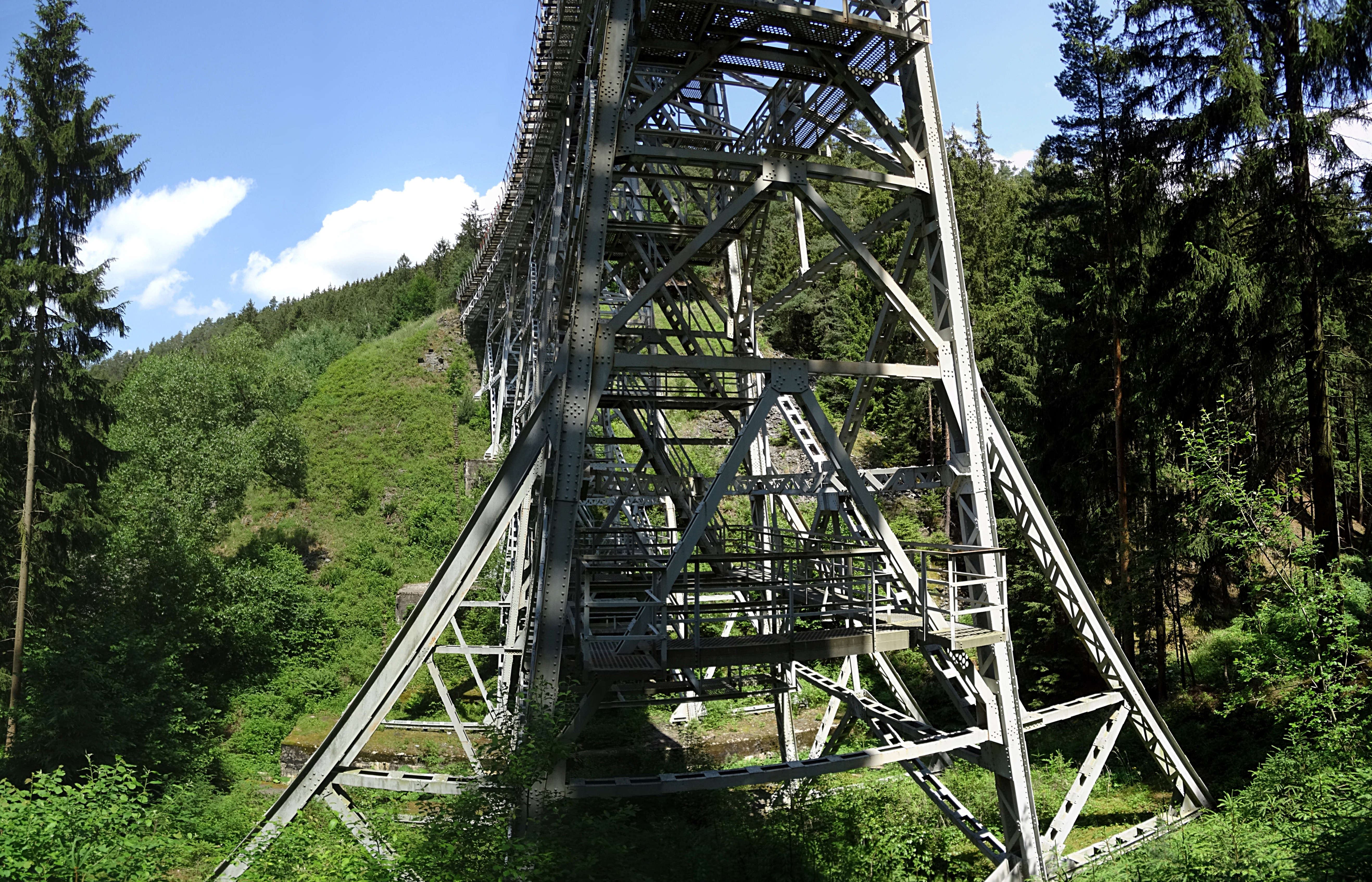 unter der Ziemestalbrücke, Panorama-Blick nach Norden